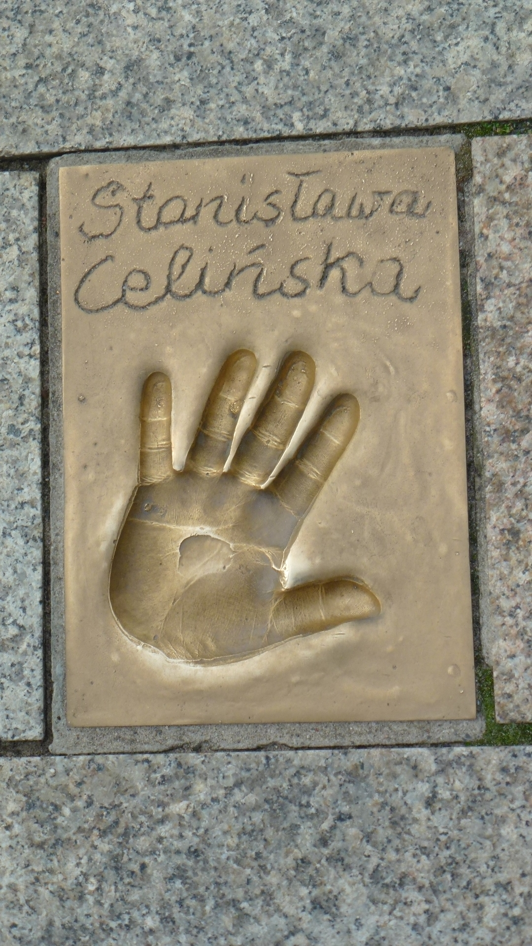 Odcisk gwiazdy na ul. Aleji Gwiazd w Międzyzdrojach woj. zachodniopomorskie pow. kamieński